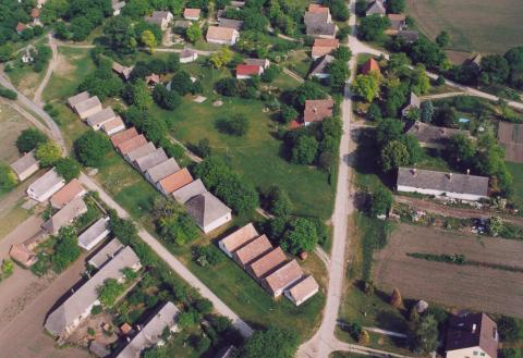 Györköny, Hungary, aerialphotography